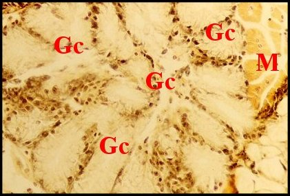 Glandes gnathocoxales de Mastophora toutes "classiques". Pas de dimorphisme sexuel